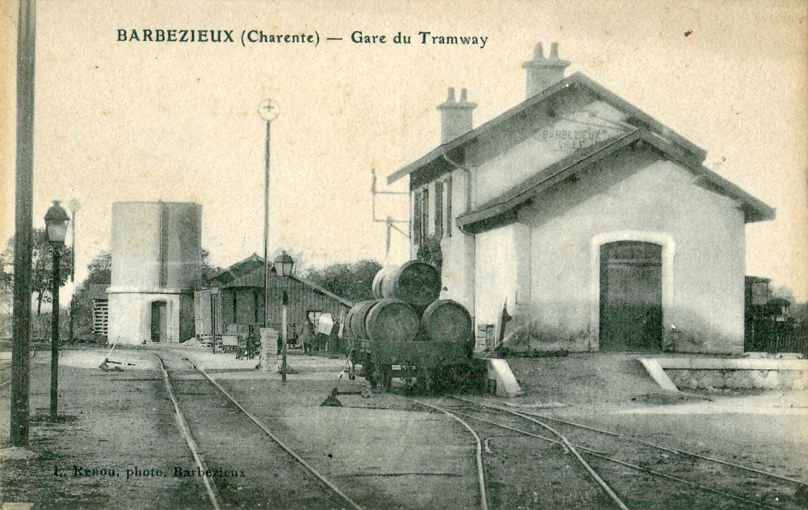 Carte postale ancienne éditée par E. Renou à Barbezieux : BARBEZIEU - Gare du Tramway (Chemins de fer économiques des Charentes)